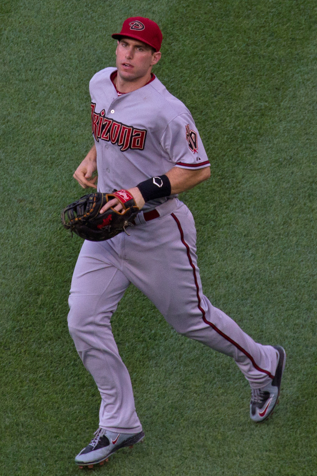 Paul Goldschmidt